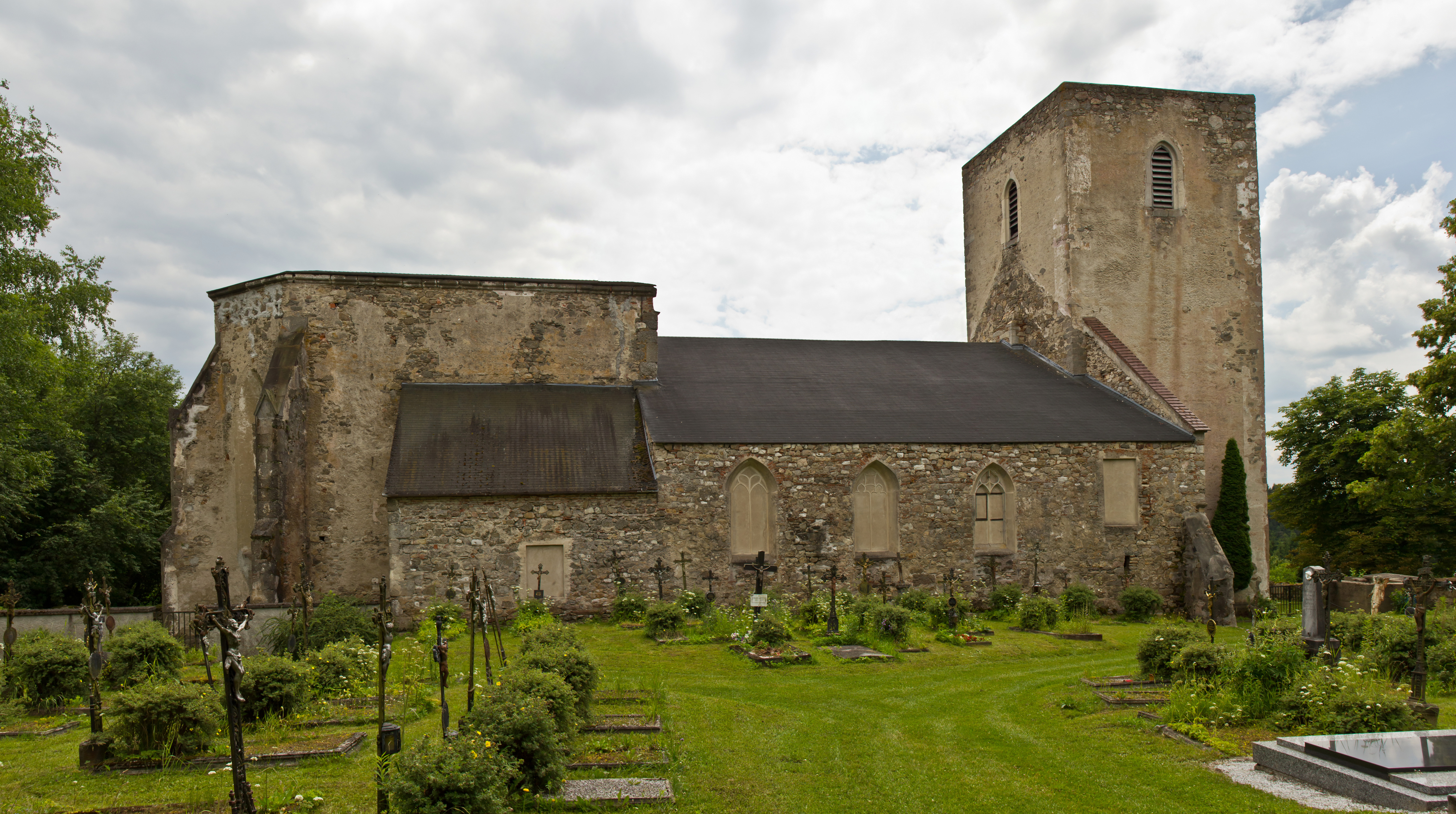 Die ehemalige Pfarrkirche von Döllersheim ist eine romanische Burgkirche, 1313 urkundlich erwähnt, mit einer spätgotischen, dreischiffigen Staffelhalle und vorgesetztem Westturm. Die Kirche steht auf dem Gebiet des Truppenübungsplatzes Allentsteig und wird seit 1976 renoviert.